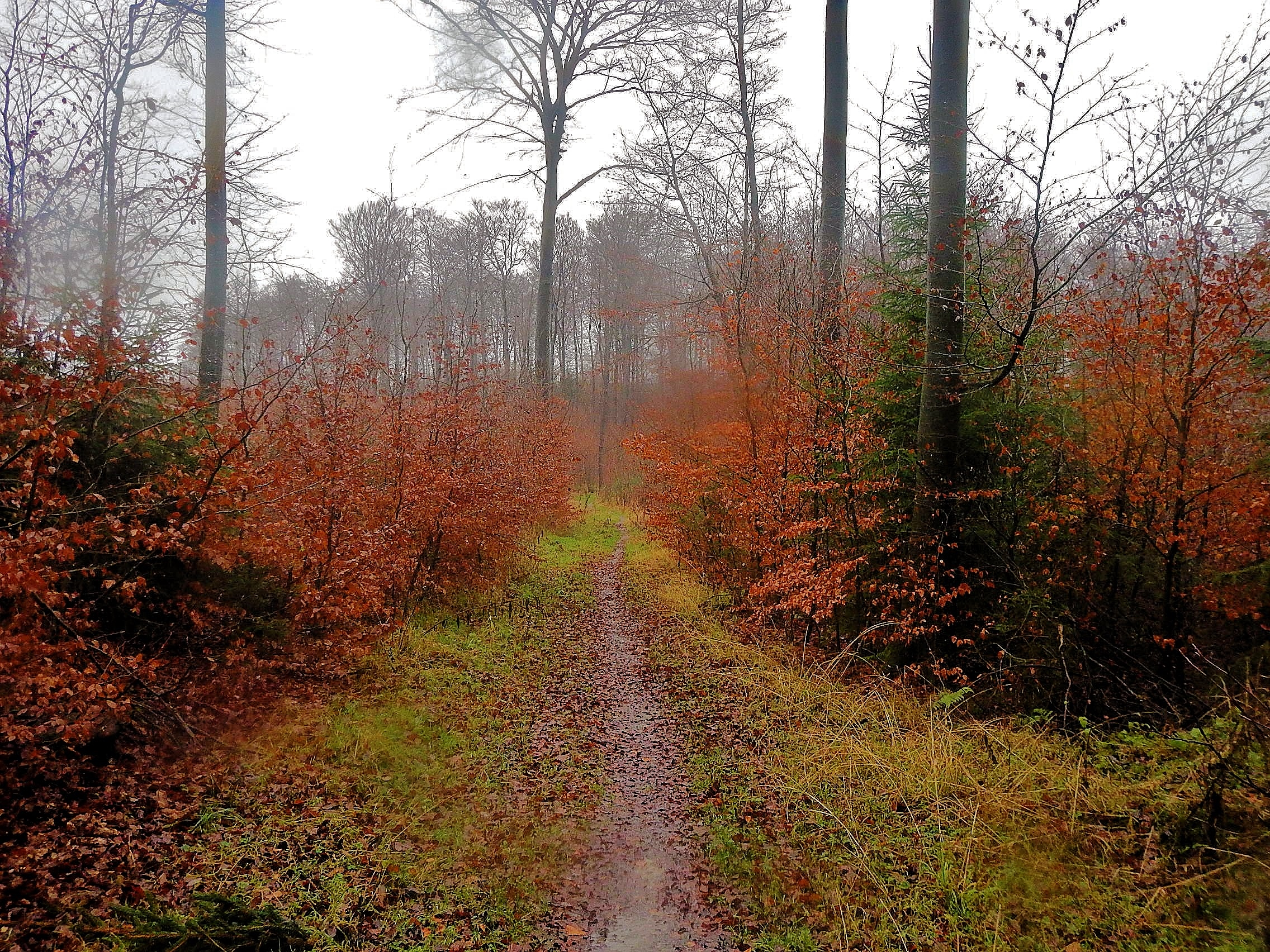 Der Rundweg um den Sorpesee beträgt ca. 17 km